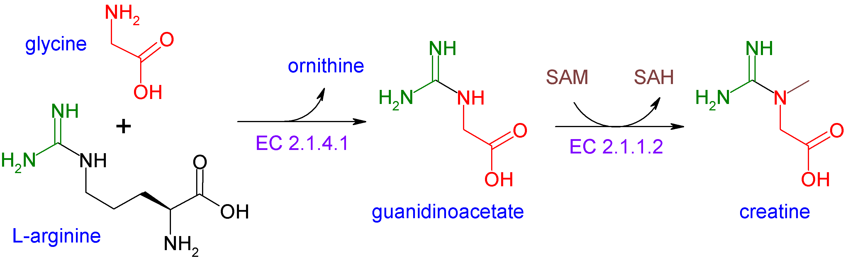 クレアチンの合成経路